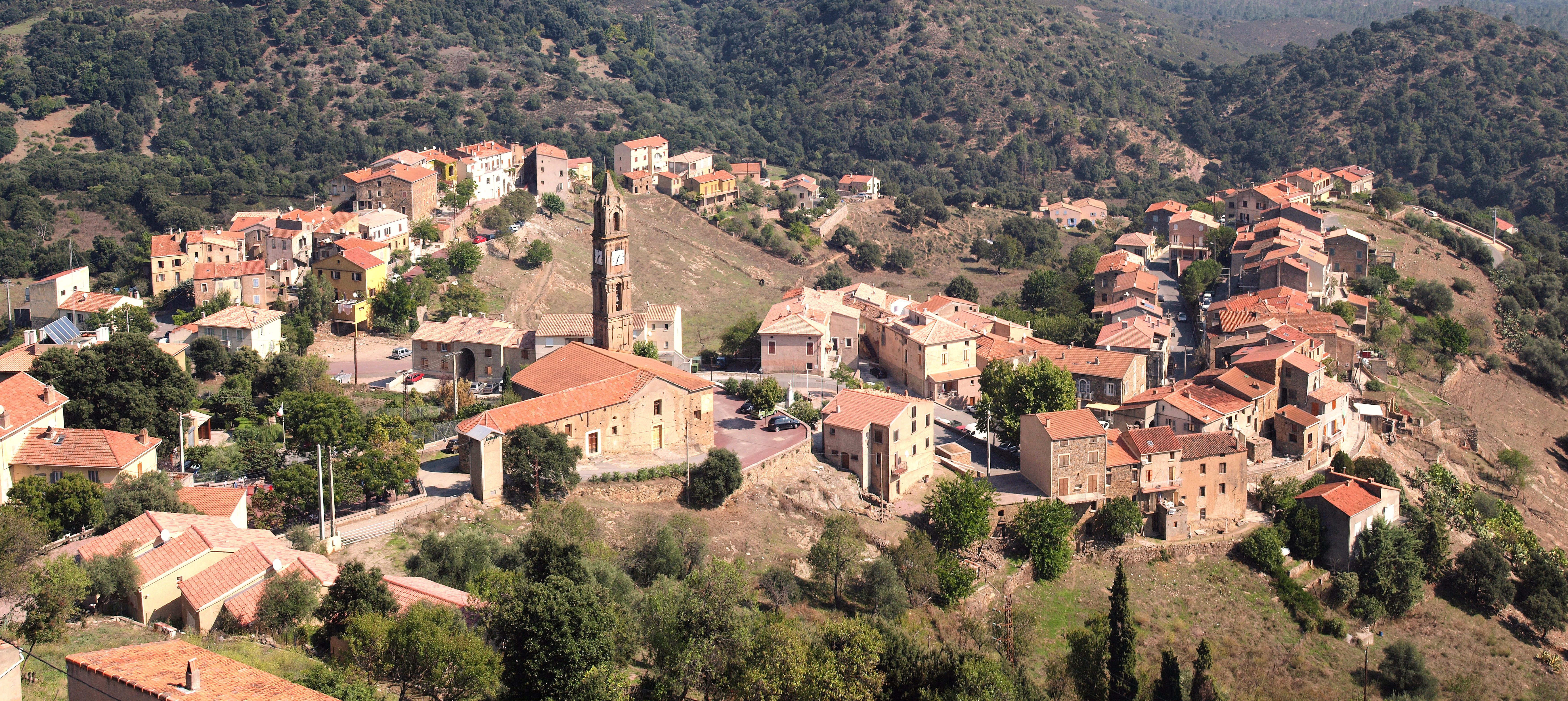 Moltifao - Eglise de l'Annonciation et hameaux de Borgo (gauche) et de Campretti (gauche)